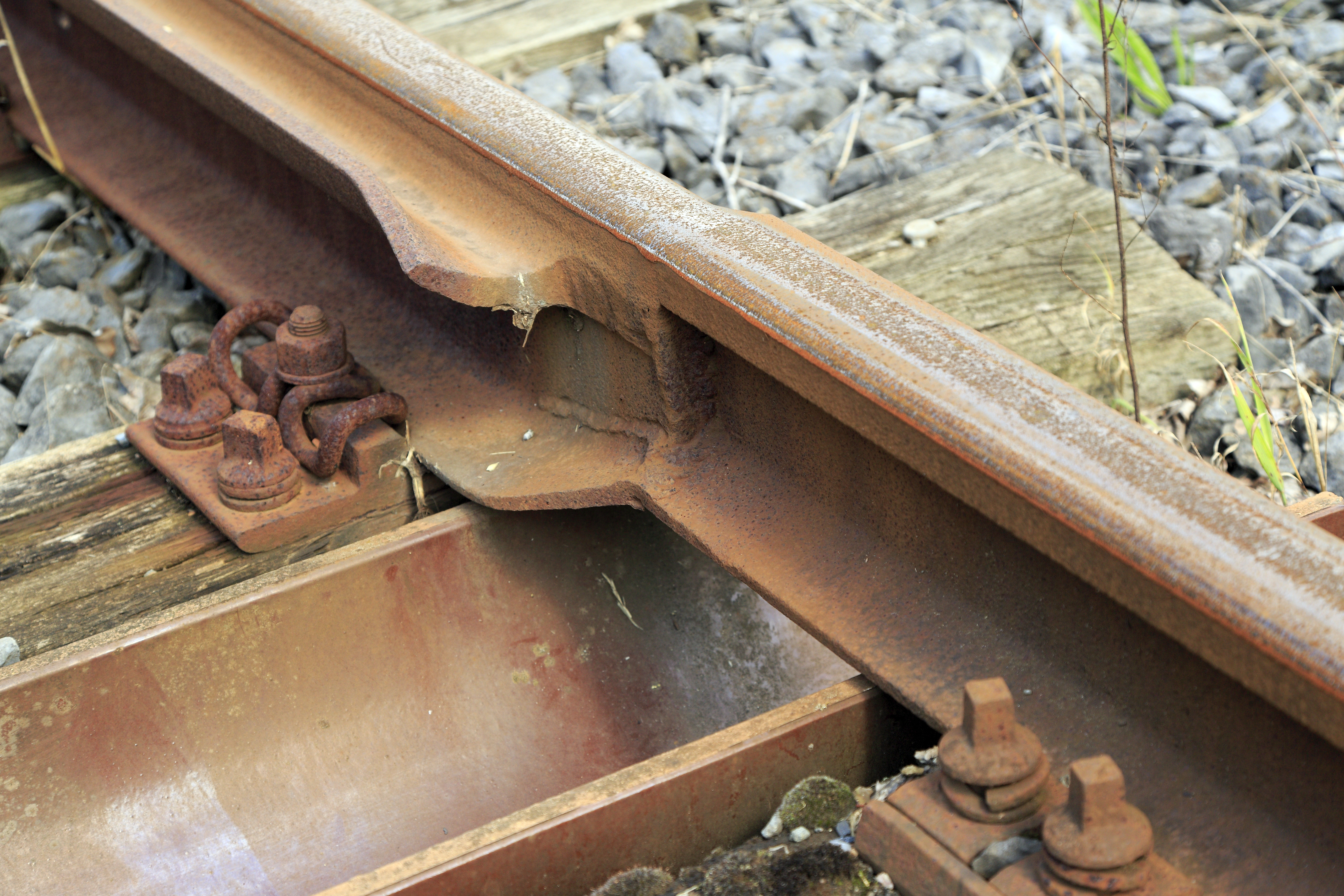 … zwischen S 49 und Rillenschiene mit Fernbahnprofil. Bis auf den Schienenkopf fluchtet kein weiteres Teil, um ein Loch zwischen den Stegen zu vermeiden, musste ein zusätzliches Teil beigelegt werden.